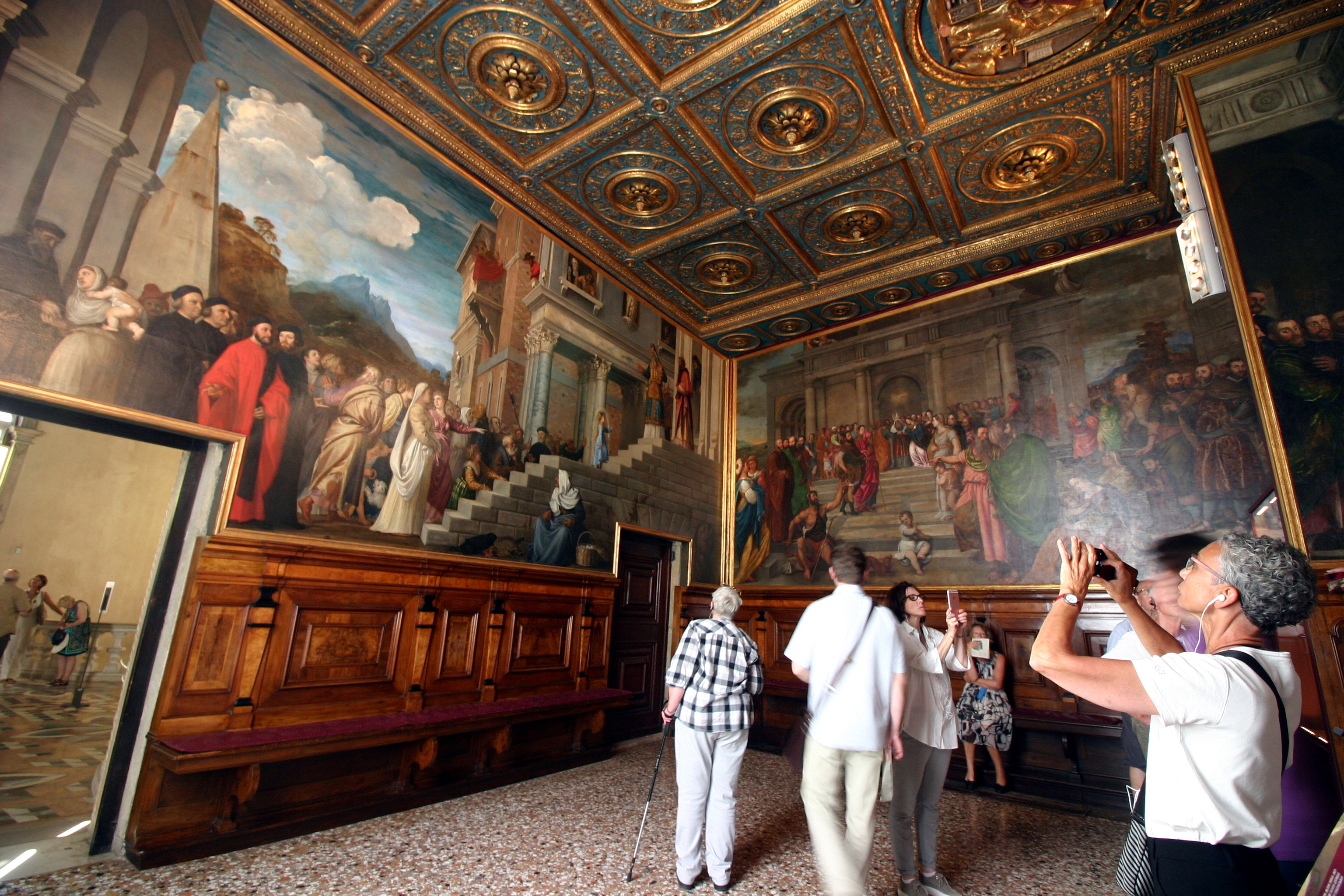 Sala dell'Albergo - Accademia